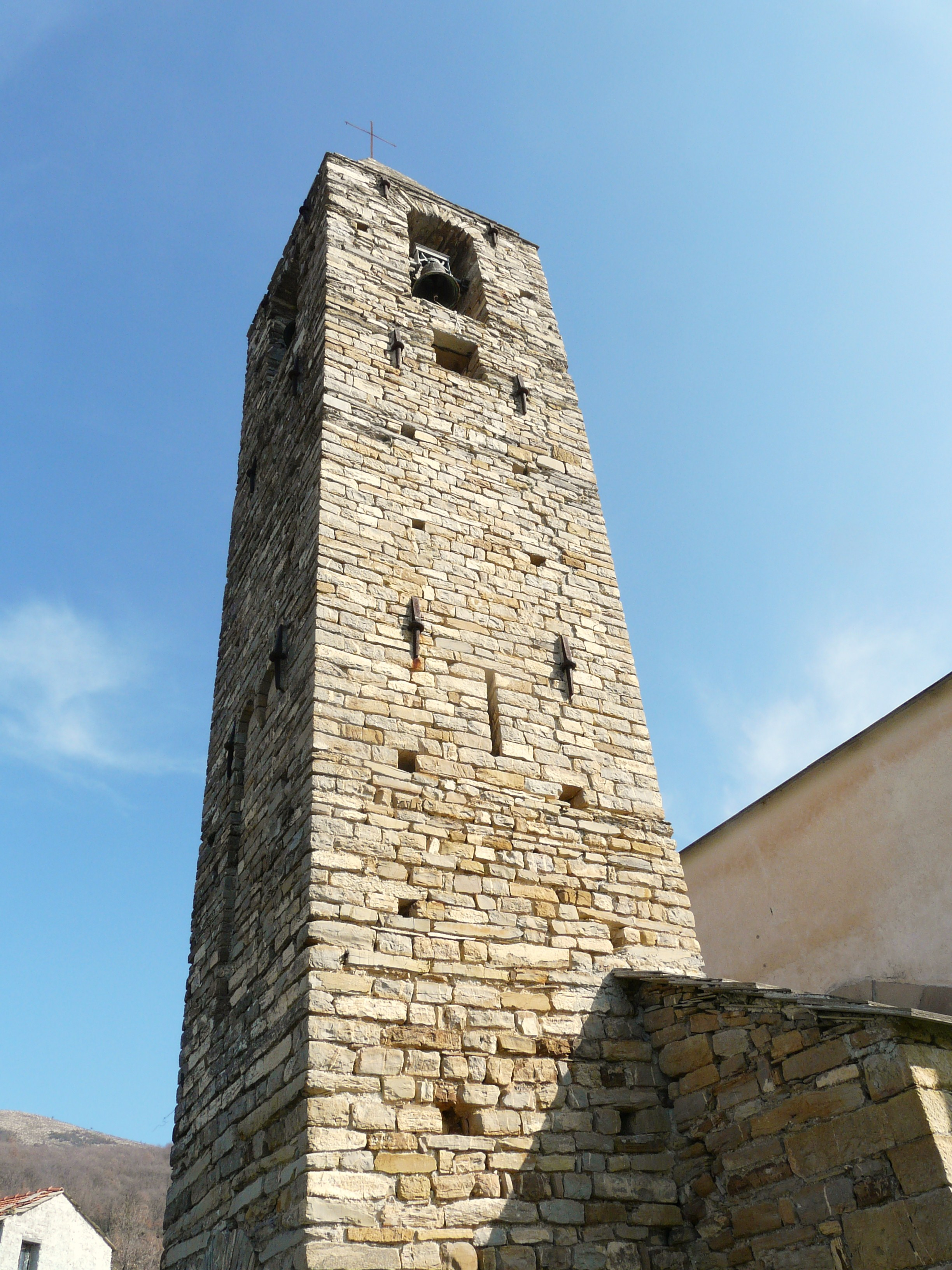 Santuario di Sant'Andrea, Aurigo, Liguria, Italia